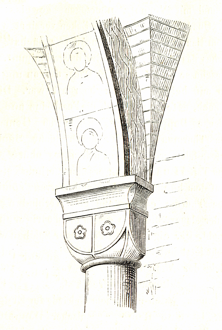 Zeichnung Von A. Essenwein, Aus dem Beitrag: Die mittelalterlichen Baudenkmale der Stadt Friesach in Kärnthen, veröffentlicht in den Mittheilungen der kaiserl. königl. Central-Commission zur Erforschung und Erhaltung der Baudenkmale Band 8, 1863 Druck: k. k. Hof- und Staatsdruckerei Zuordnung der Zeichnungen entsprechend dem Dateinamen